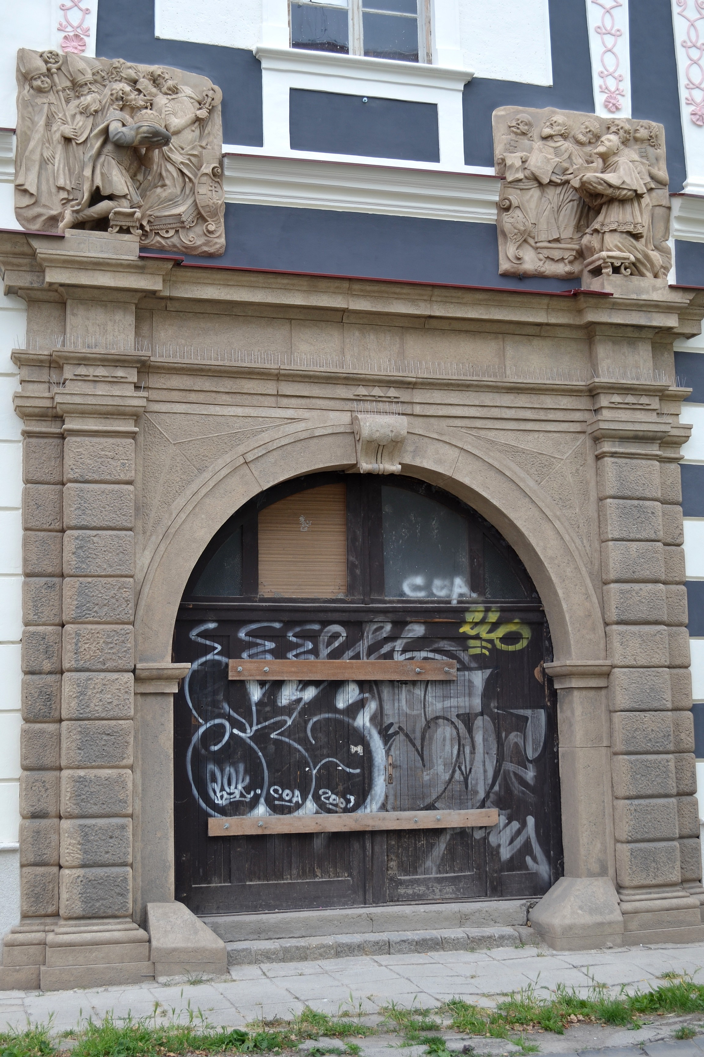 Trnava, komplex univerzitných budov; budova Seminára svätého Štefana; portál budovy